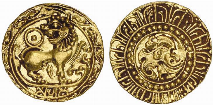 ಕನ್ನಡ: ಕದಂಬ - ತೊಯಿಮದೇವ - ೧೦೪೮ - ೧೦೭೫ AD 'ಕದಂಬ' ವಂಶವು ಕನ್ನಡದ ಮೊಟ್ಟ ಮೊದಲ ರಾಜ ವಂಶ. ಕನ್ನಡದಲ್ಲಿ ದೊರೆತಿರುವ ಮೊಟ್ಟಮೊದಲ ಶಾಸನವಾದ ಹಲ್ಮಿಡಿ ಶಾಸನವು ಕದಂಬರ ಆಳ್ವಿಕೆಯ ಕಾಲಕ್ಕೆ ಸೇರಿದ್ದಾಗಿದೆ.